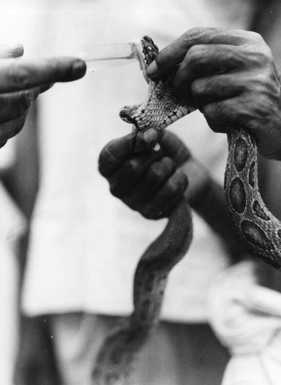 Tibetexpedition, Melken einer Schlange Kalkutta, Giftentnahme